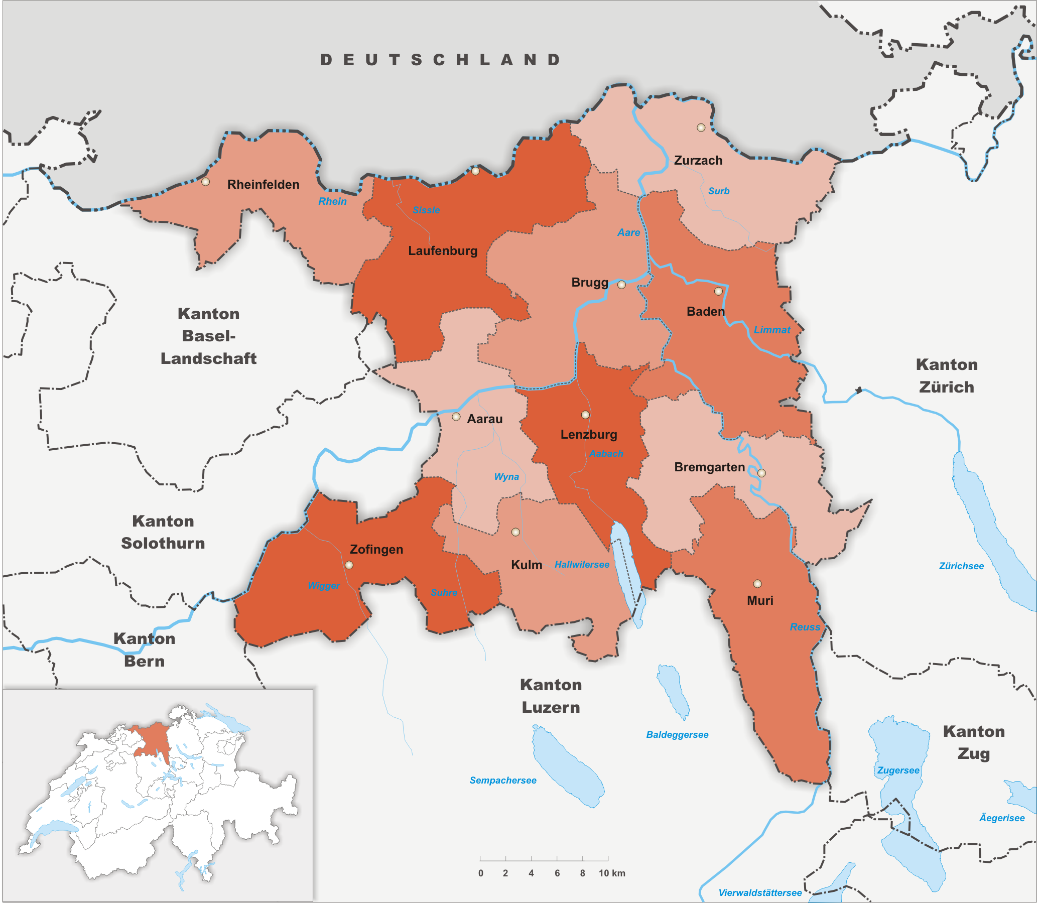 Bezirke des Kanton Aargau.